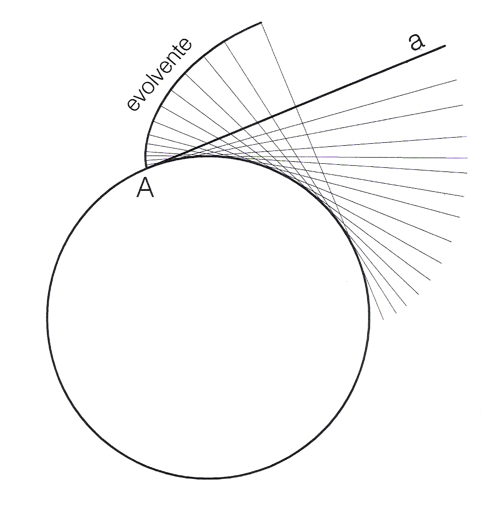 costruzione dell'evolvente di cerchio per rotolamento della retta generatrice